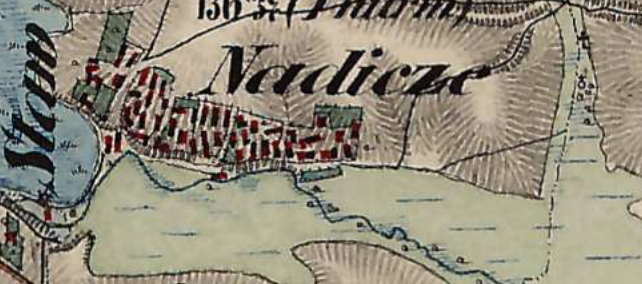 19 та Капличка перенесення мощей святого Миколая